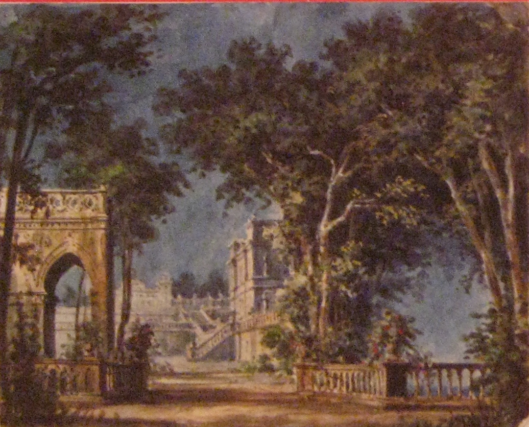 Simone Boccanegra. Set design realized on commission of Ricordi & c. by Girolamo Magnani for the premiere at Teatro alla Scala, March 24, 1881